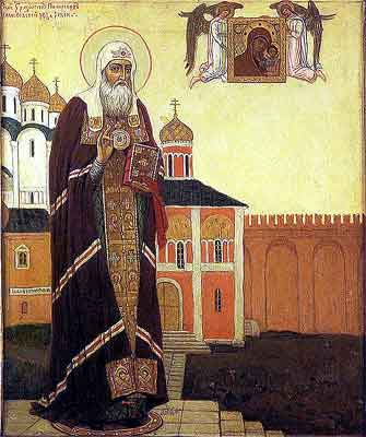 Св. Гермоген Патриарх Московский, Москва, 1915, 36.5х33, Государственный музей истории религии, СПб